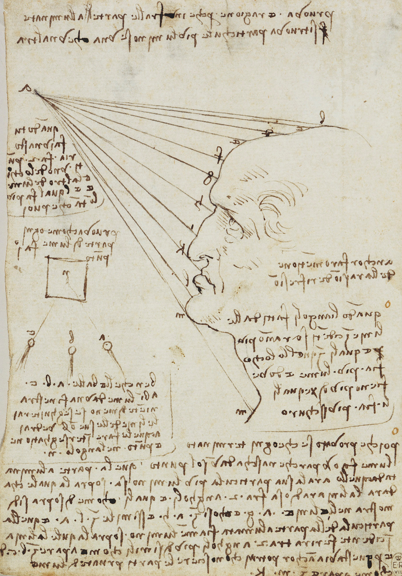 Studio della luce sul volto